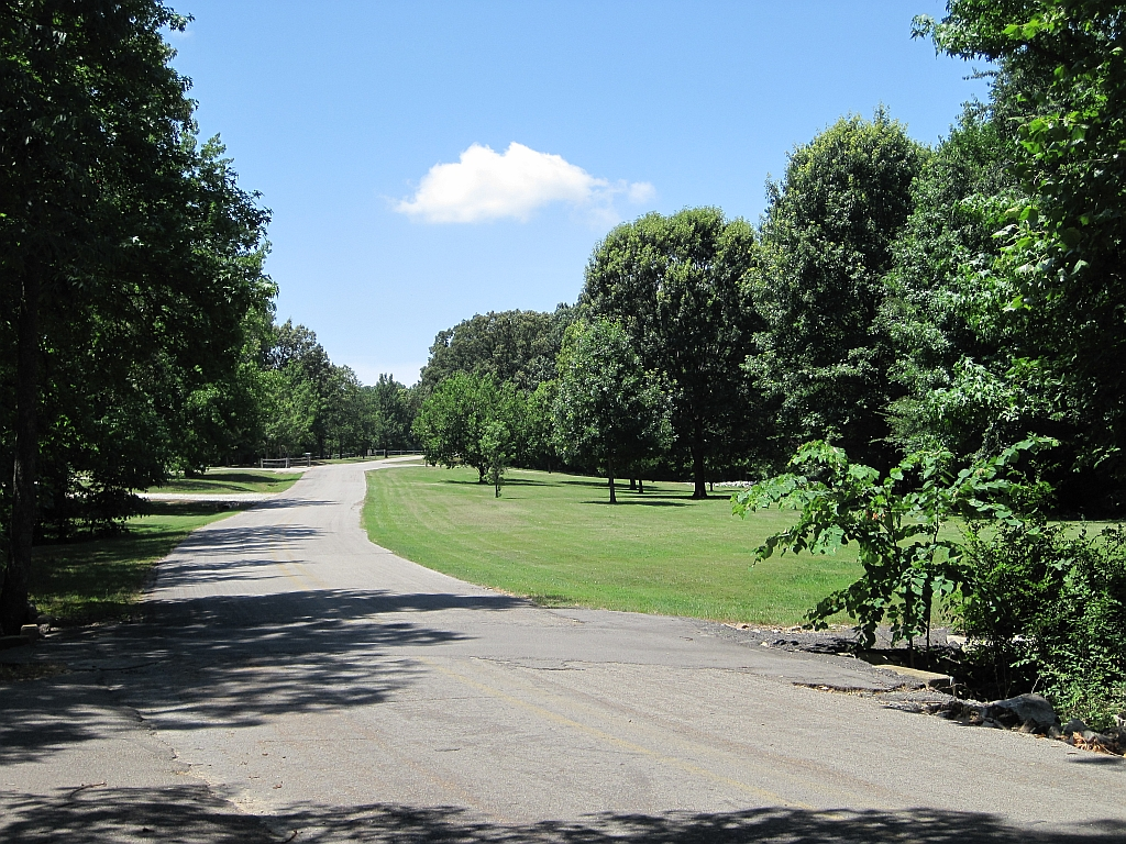 Lake Poinsett State Park, Arkansas